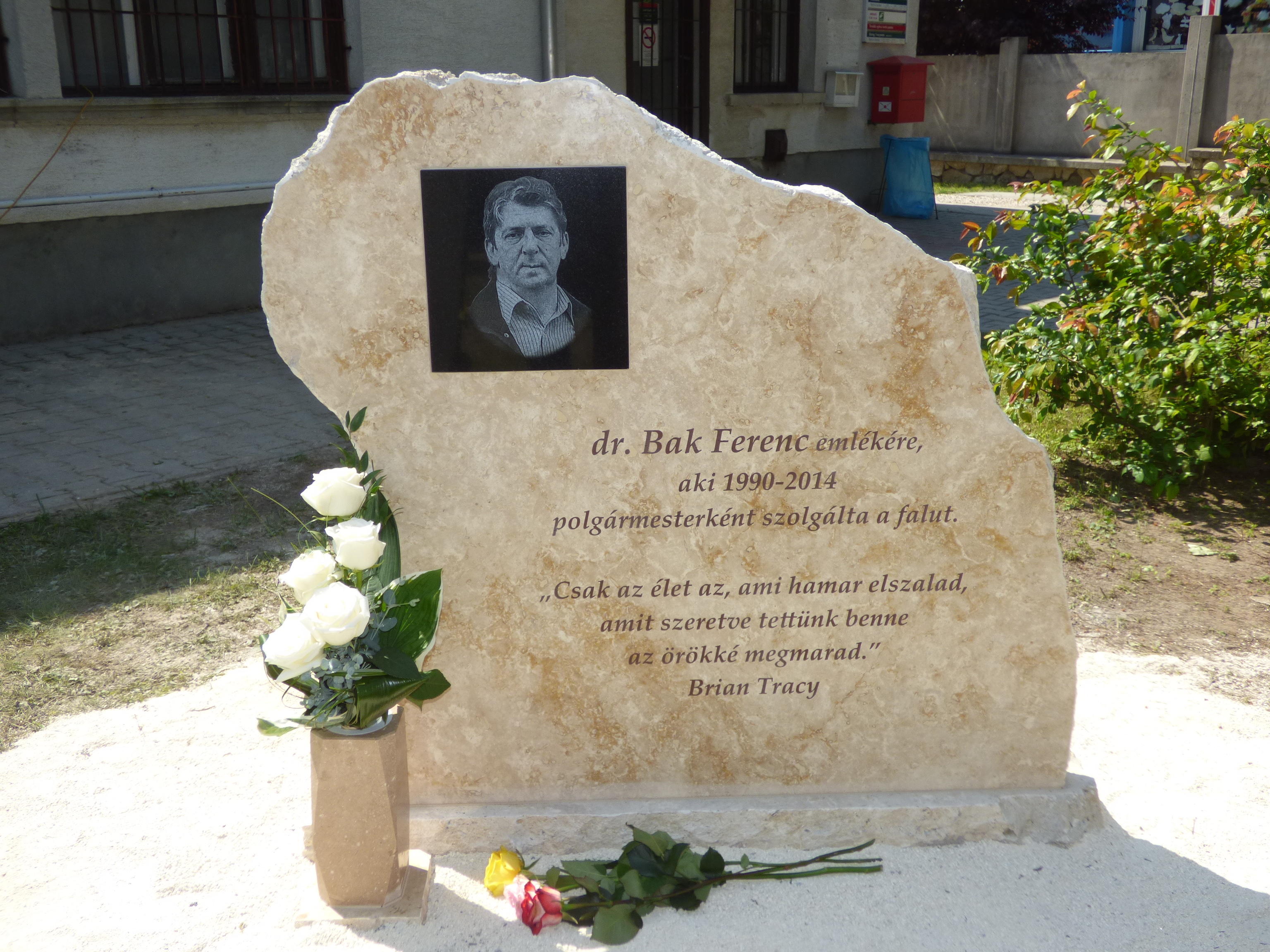 Dr. Bak Ferenc polgármester (1990-2014) emléktáblája a tinnyei községháza előtt, a felavatás napján